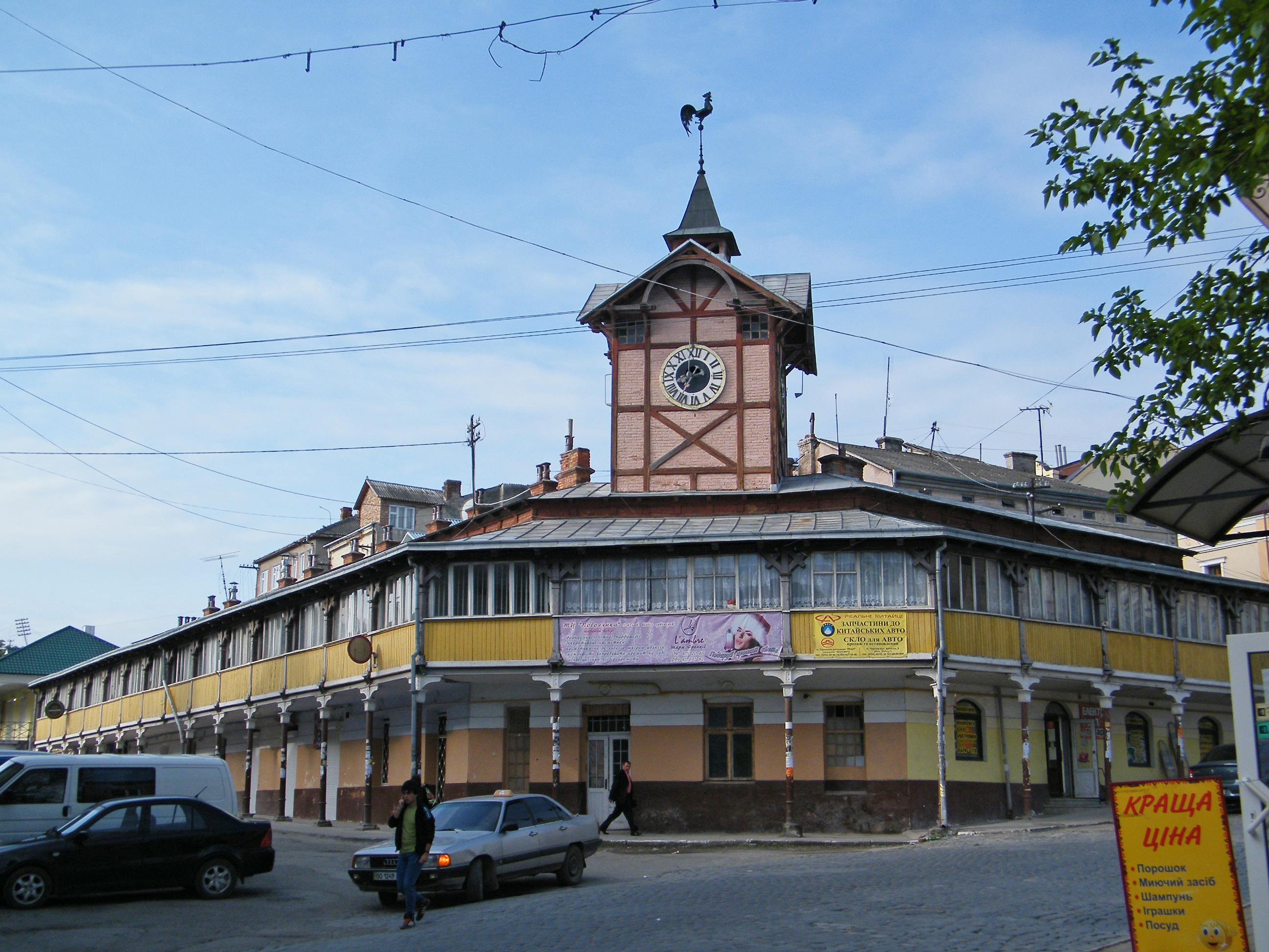 Старая ратуша